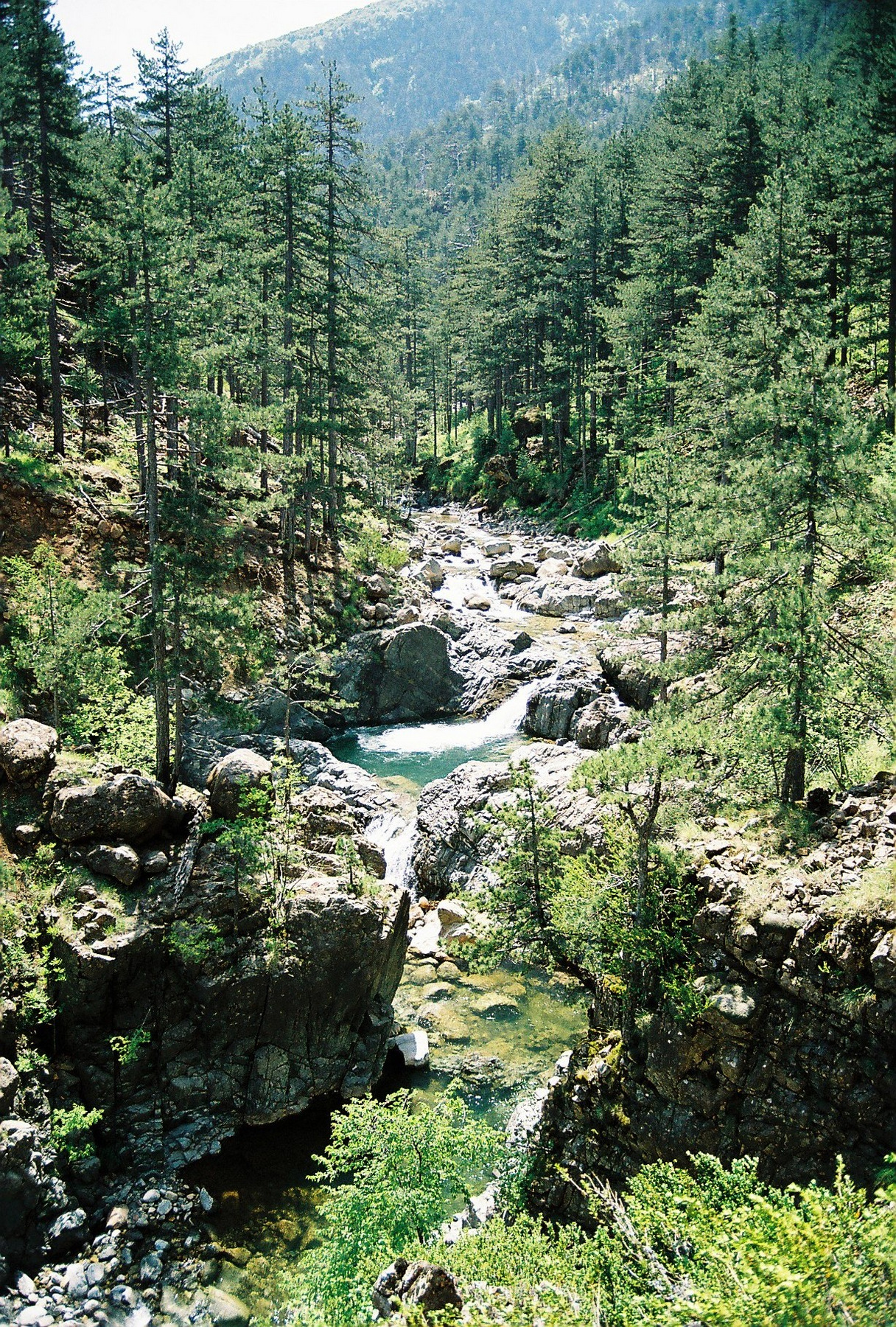 Arkoudorema river into Pindus National Park. This is a photography of Natura 2000 protected area with ID GR1310002